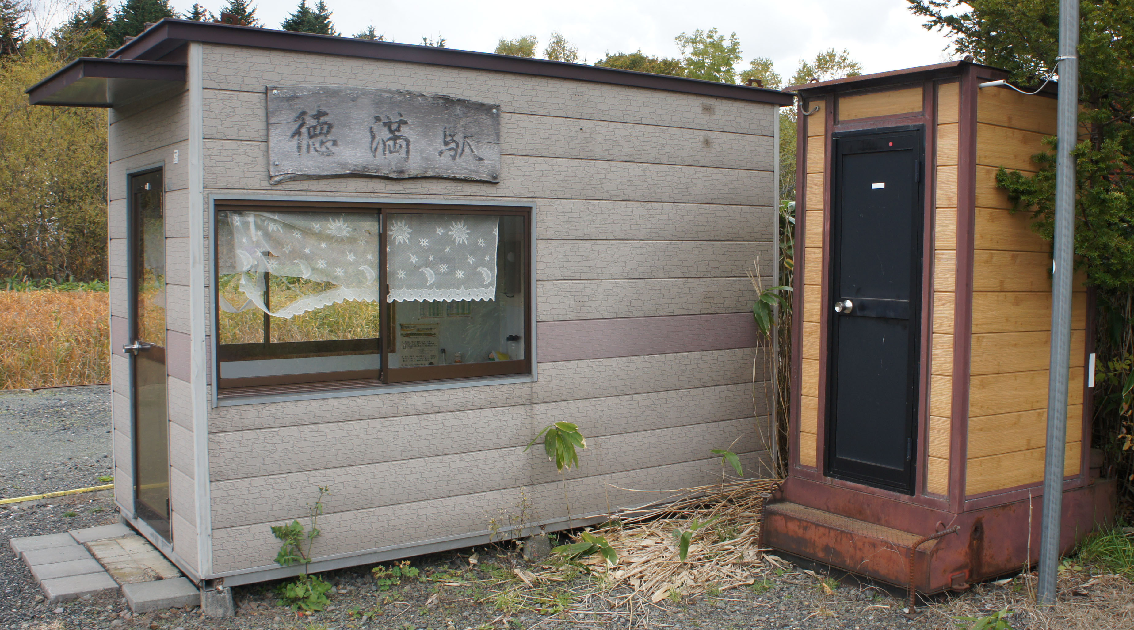 JR宗谷本線・徳満駅の駅舎 Sony NEX-3